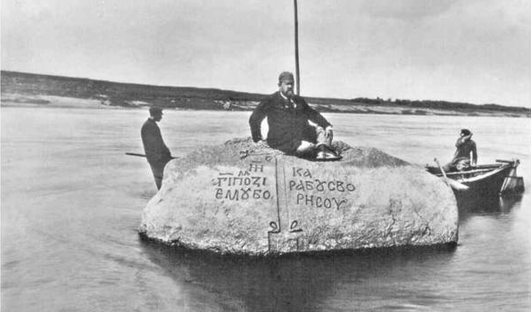 Борисов камень. На камне - проф. И. А. Шляпкин.